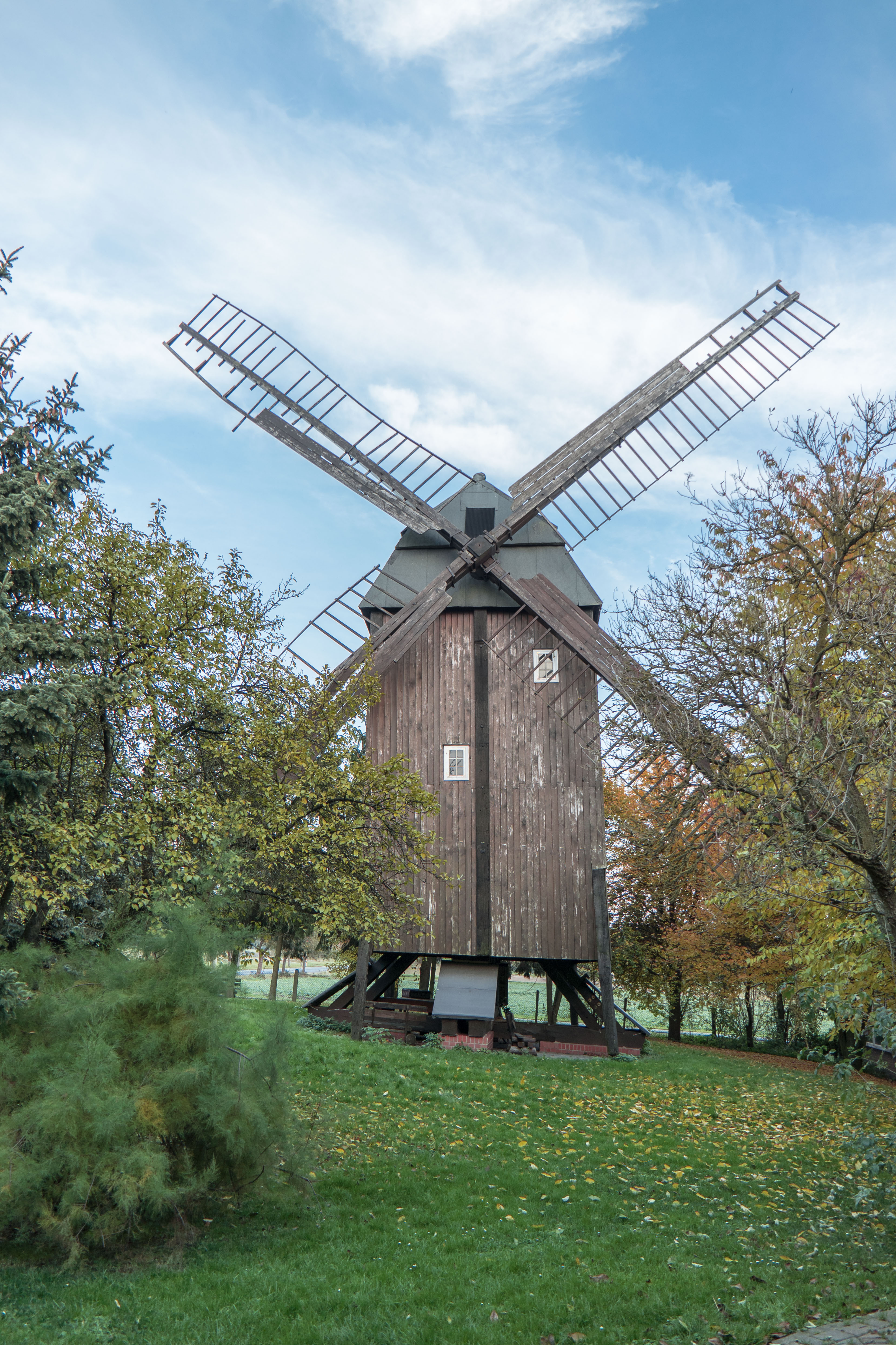 Bockwindmühle, Vor dem Seehäuser Tor in Werben (Elbe)